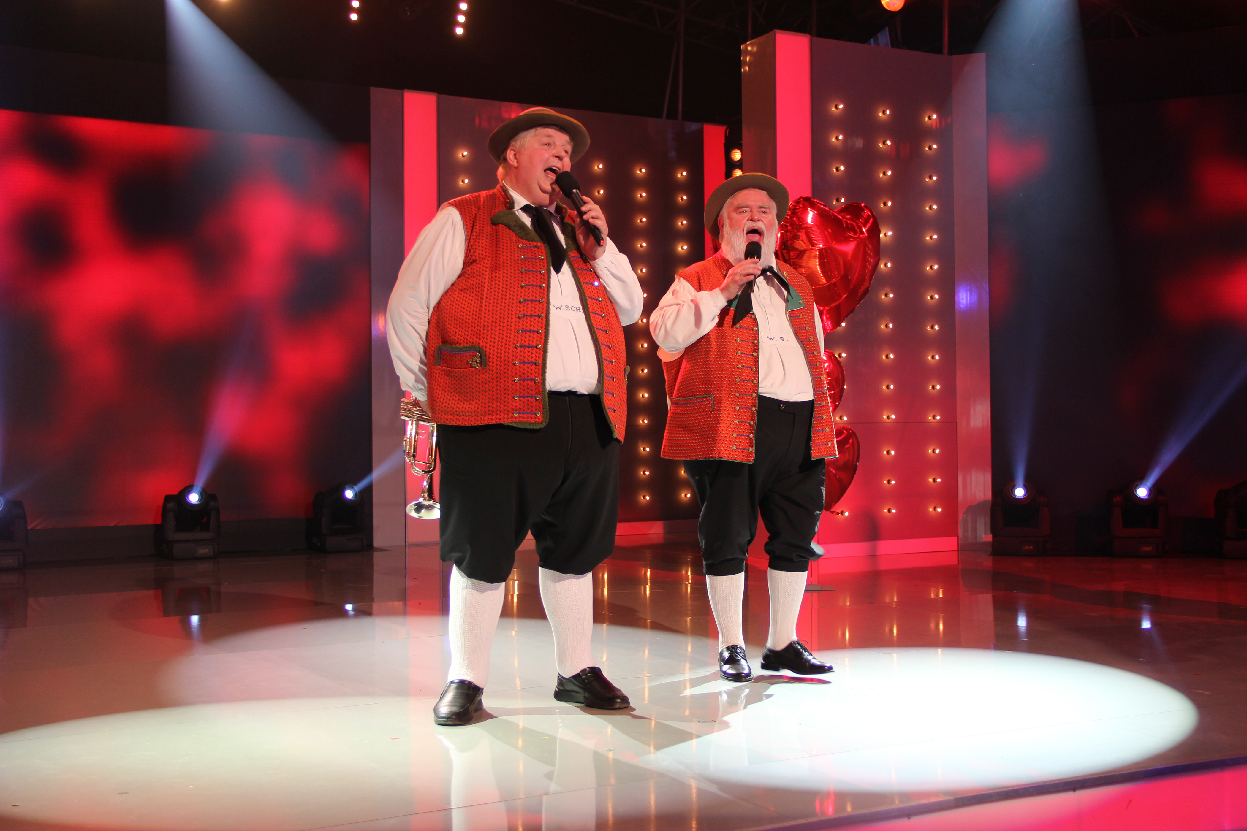 Die Wildecker Herzbuben bei der Aufzeichnung der HR Sendung "Hier spielt die Volksmusik" auf dem Hessentag 2013 in Kassel